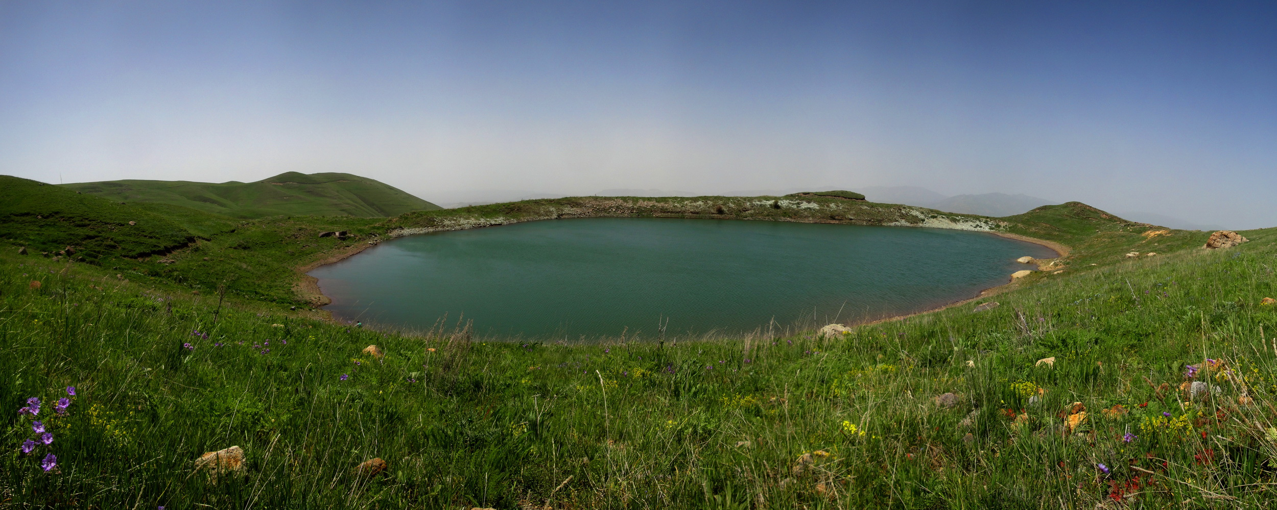 Lake Bardzruni